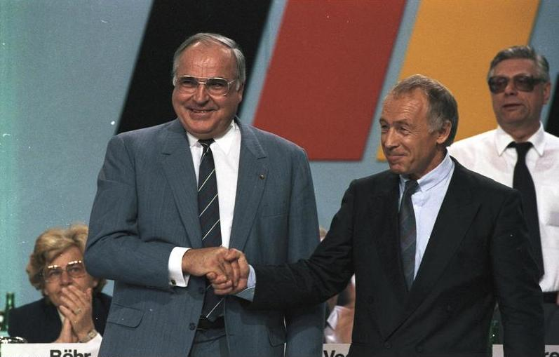 34. Bundesparteitag der CDU in der Rheingoldhalle, Mainz (6.-8.10.1986) 7.-8. Oktober 1986